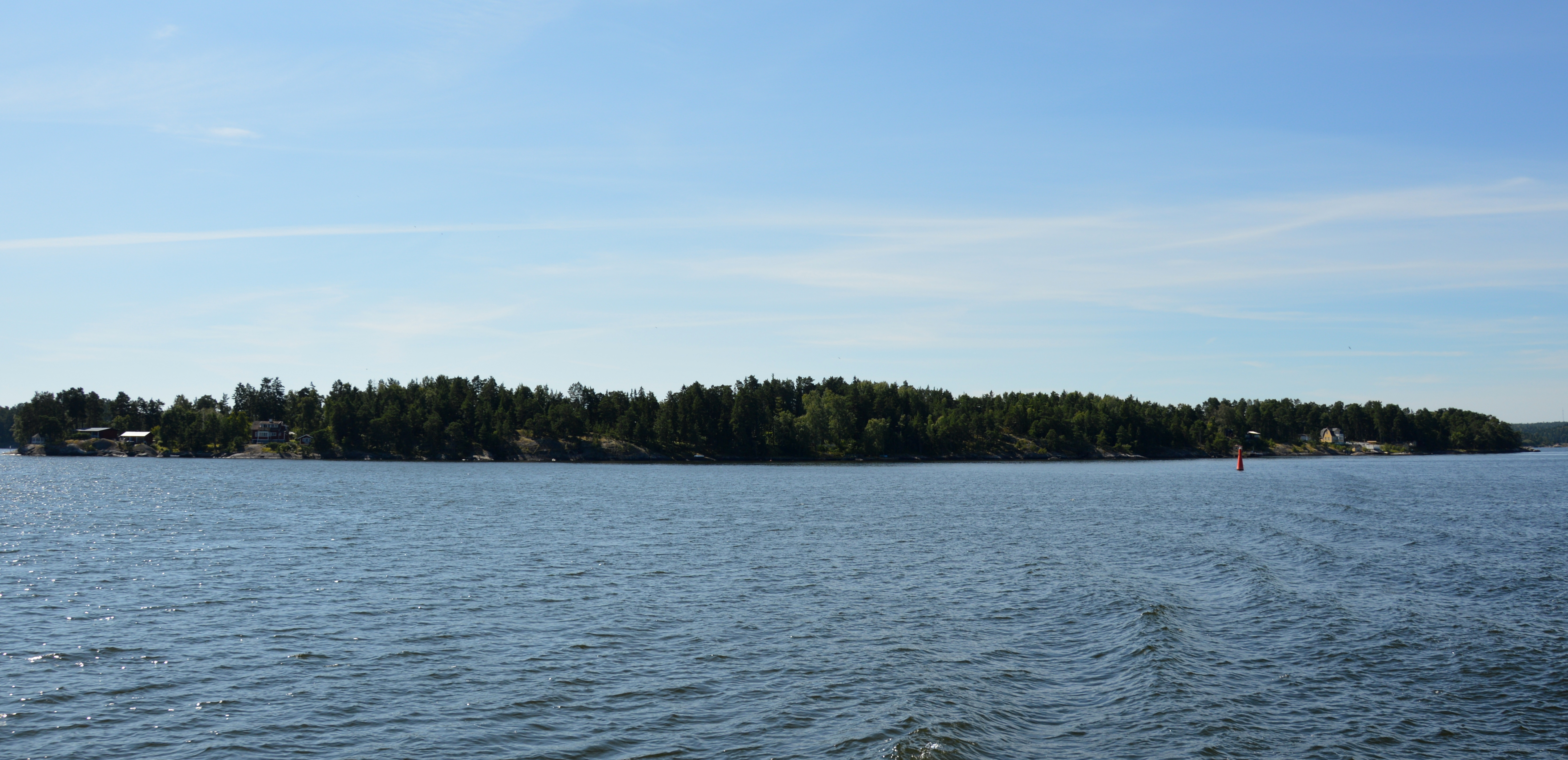 Risholmen